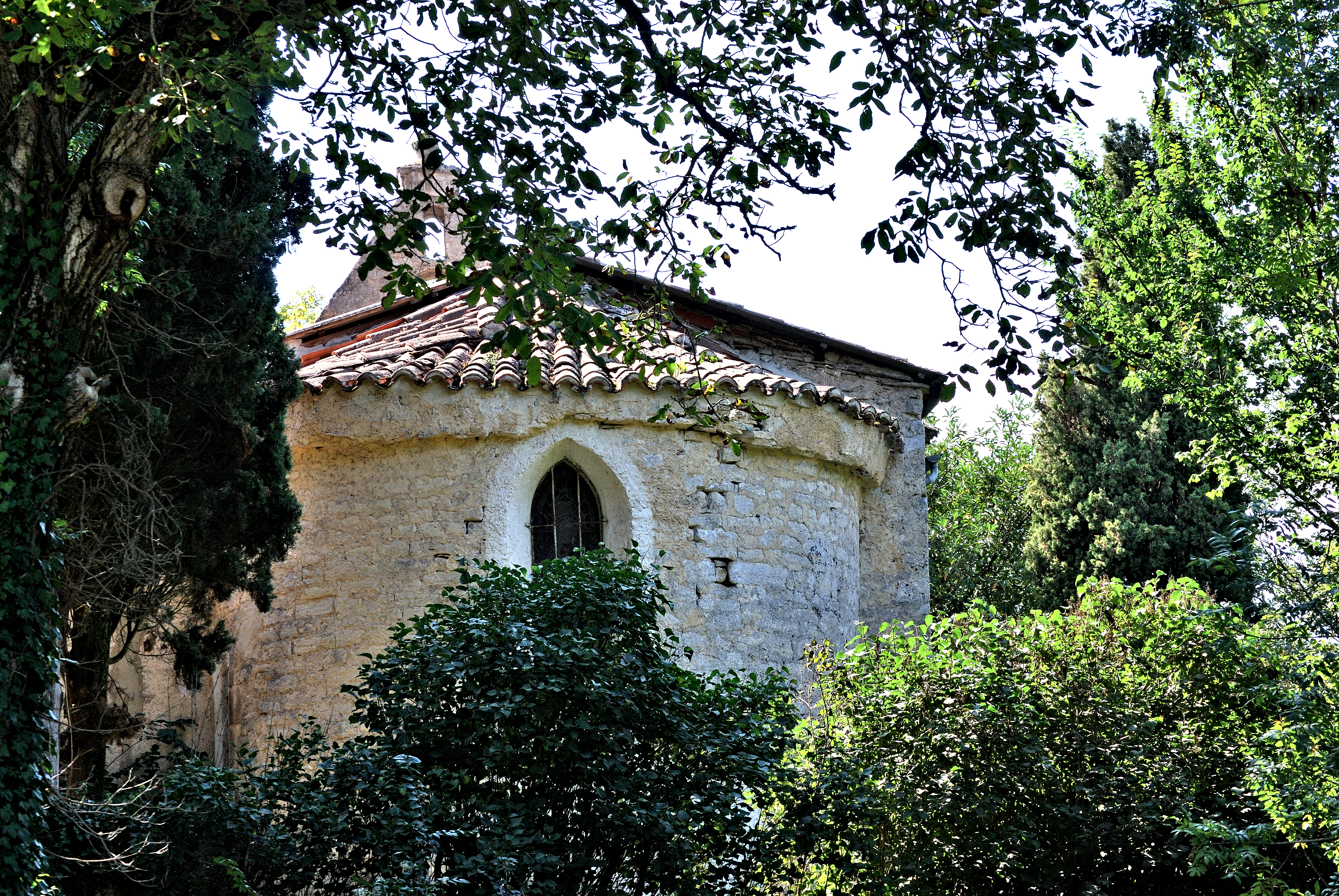 L'église Saint-Vincent de Péreille. Eglise du 12e siècle .